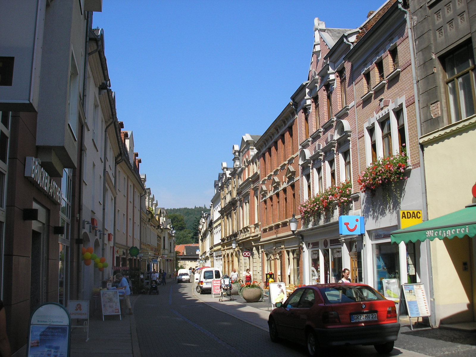 In der Fußgängerzone von Greiz (Thüringen).